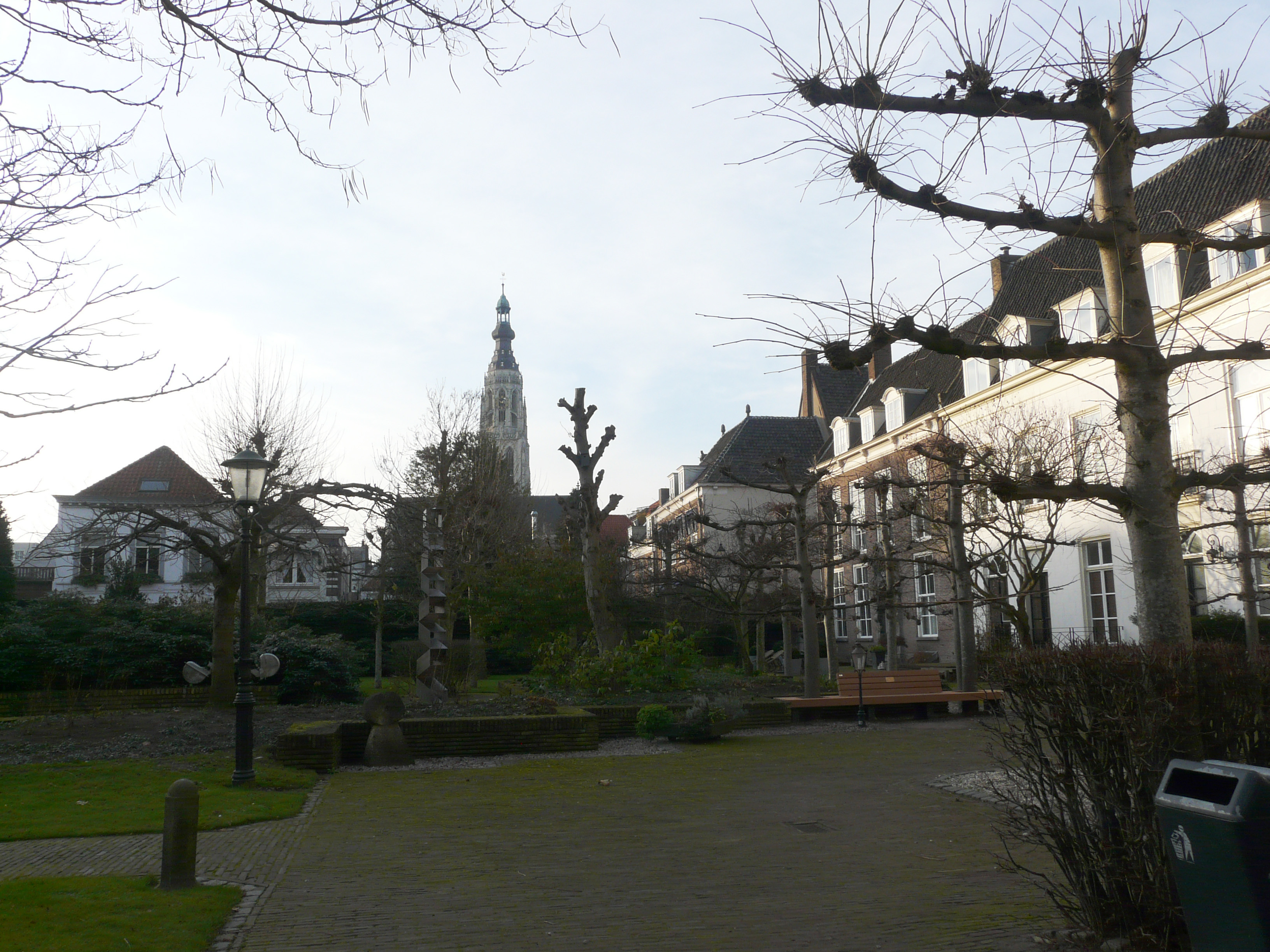 Zicht op een deel van de Willem Merkxtuin gelegen in het centrum van Breda